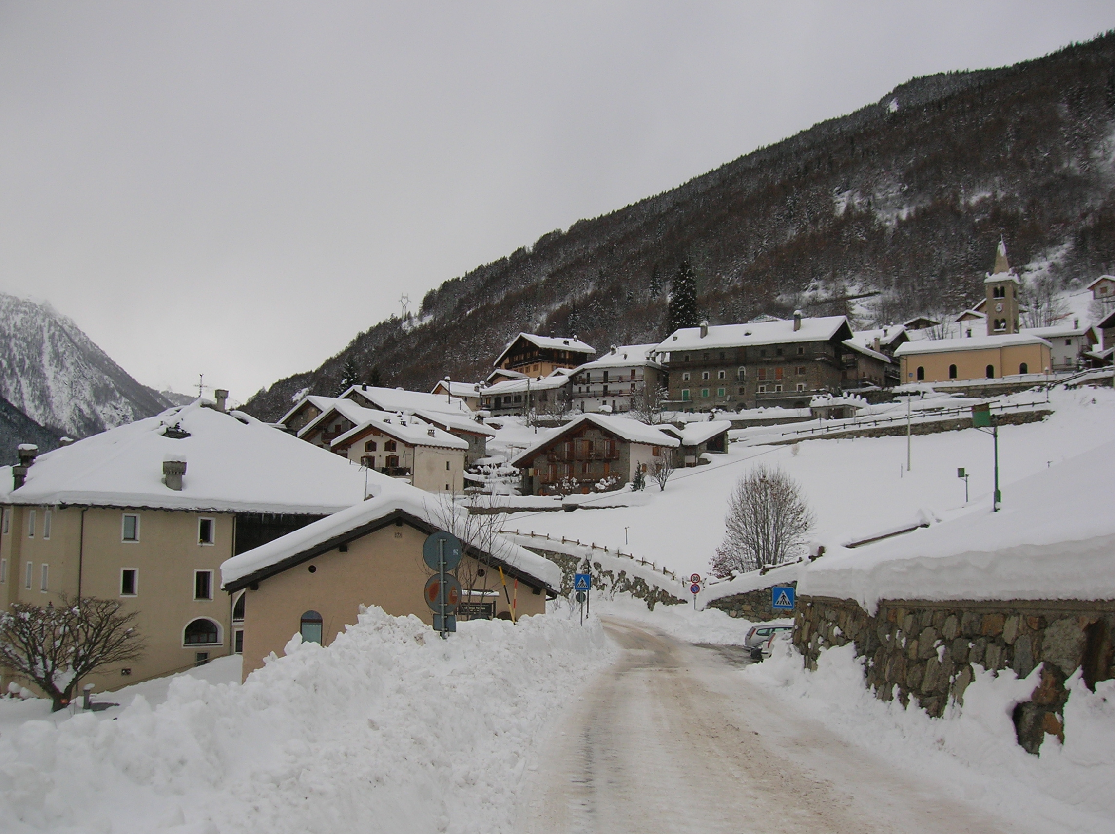 Saint-Oyen in inverno: sulla sinistra Château Verdun, al centro la Chiesa parrocchiale. Saint-Oyen, Valle d'Aosta, Italia.